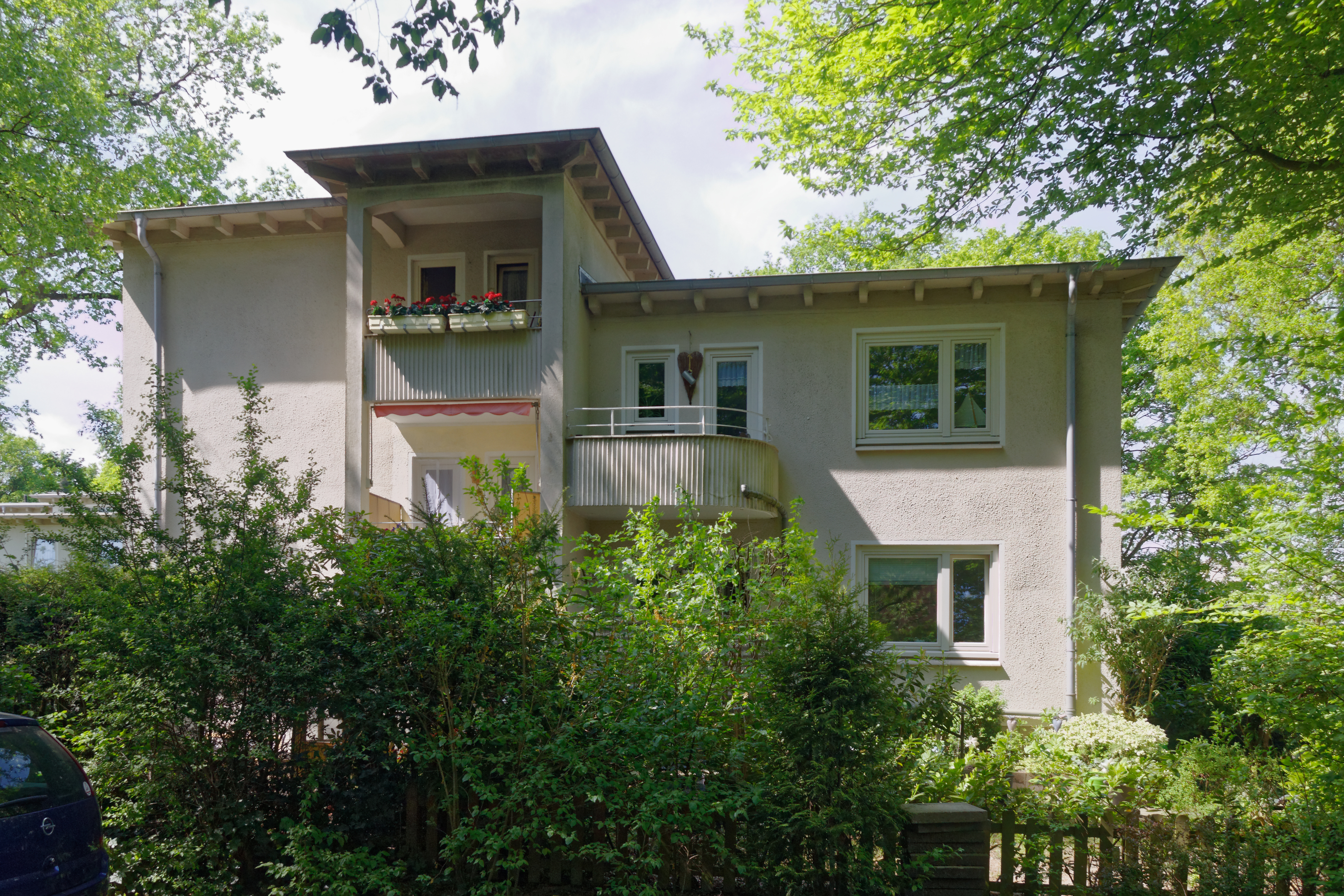 Hamburg-Rissen, Siedlung Mechelnbusch, Haus 29This is a photograph of an architectural monument.